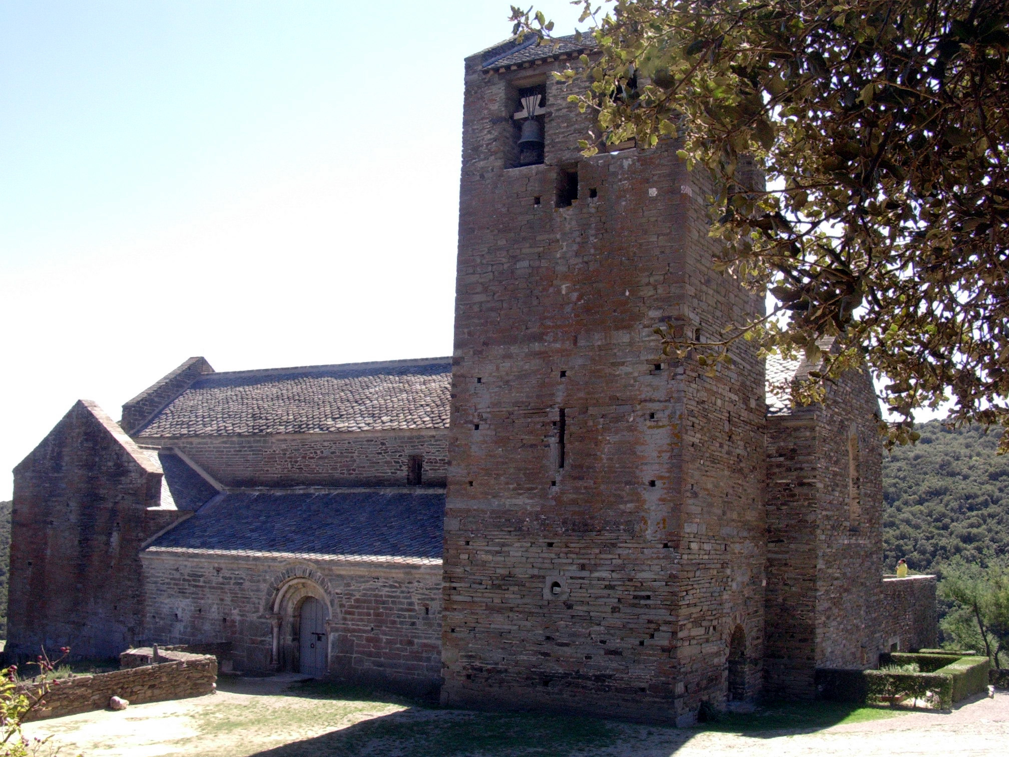 Le prieuré de Serrabonne